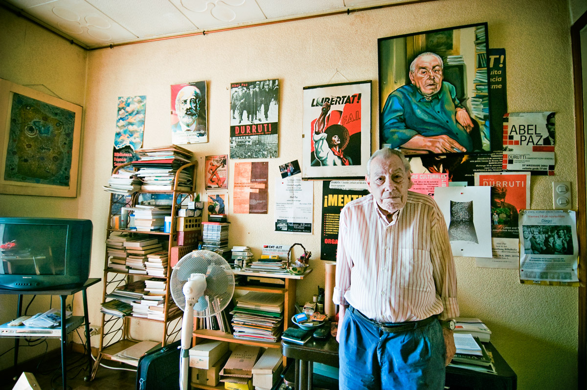 "Abel Paz, pseudonimo di Diego Camacho, uomo della columna Durruti ci ha lasciato il 13 aprile. Mai si arrese contro il fascismo, mai abbandonò le sue idee anarchiche. L'ho incontrato a Barcellona 3 anni fa, nella sua modesta casa di Carrer Verdi, in Gracia, due chiacchiere, qualche foto, un bel ricordo." cinocino